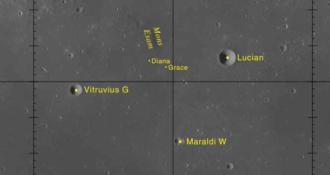 Mons Esam. Cráteres cercanos. (Imagen LRO)